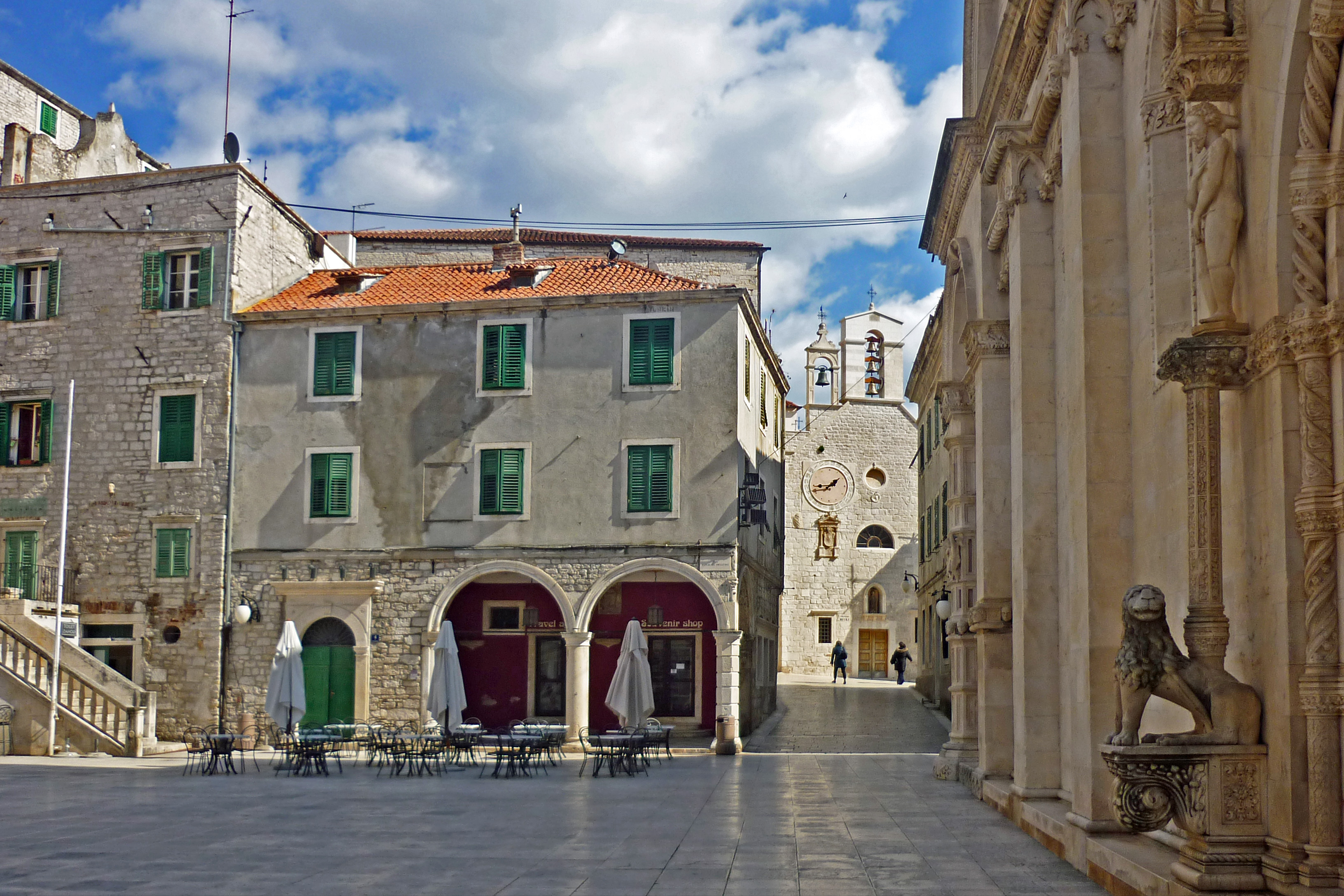 Kleine Loggia in Šibenik (dt.: Sibenning, ital.: Sebenico)